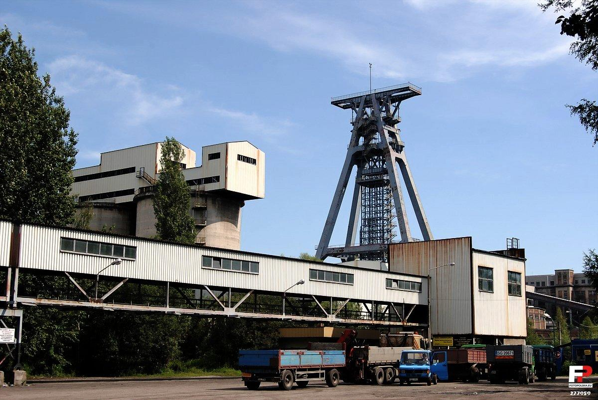 Widoczny nieukończony szyb VII głęboki 950 m , z lewej taśmociąg i kilkudniowe kolejki samochodowe za węglem